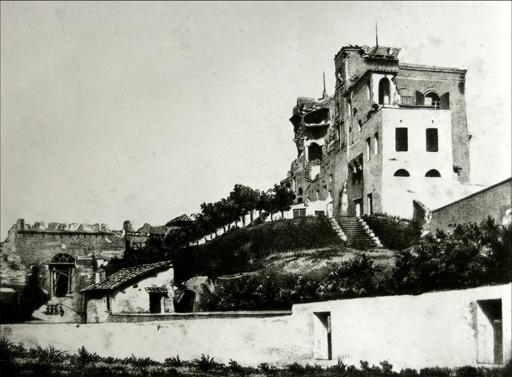 Rovine di Villa Savorelli dopo i bombardamenti al Gianicolo, Porta S. Pancrazio, da parte dei francesi contro Garibaldi nel 1849.